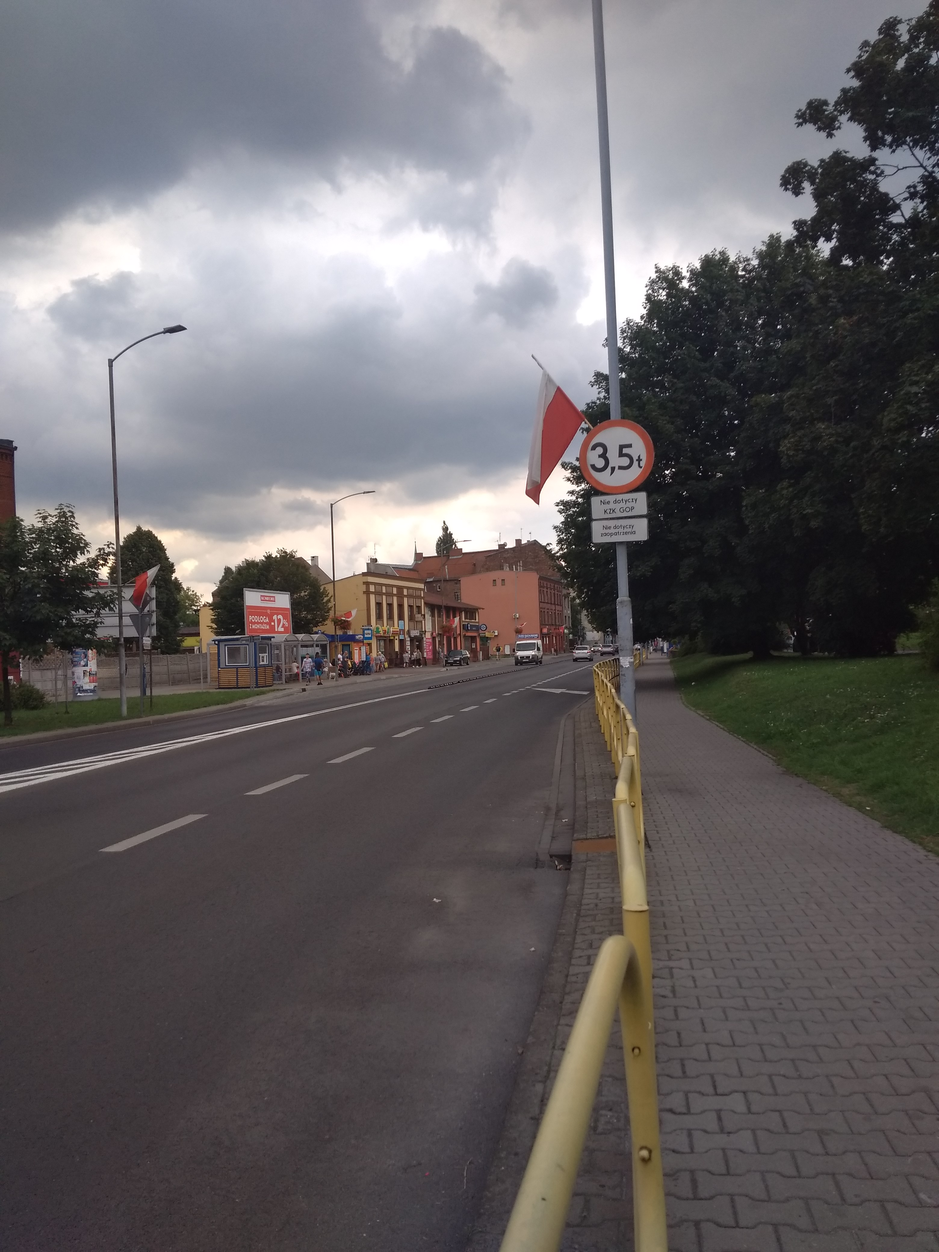 Ulica Śląska w Siemianowicach Śląskich